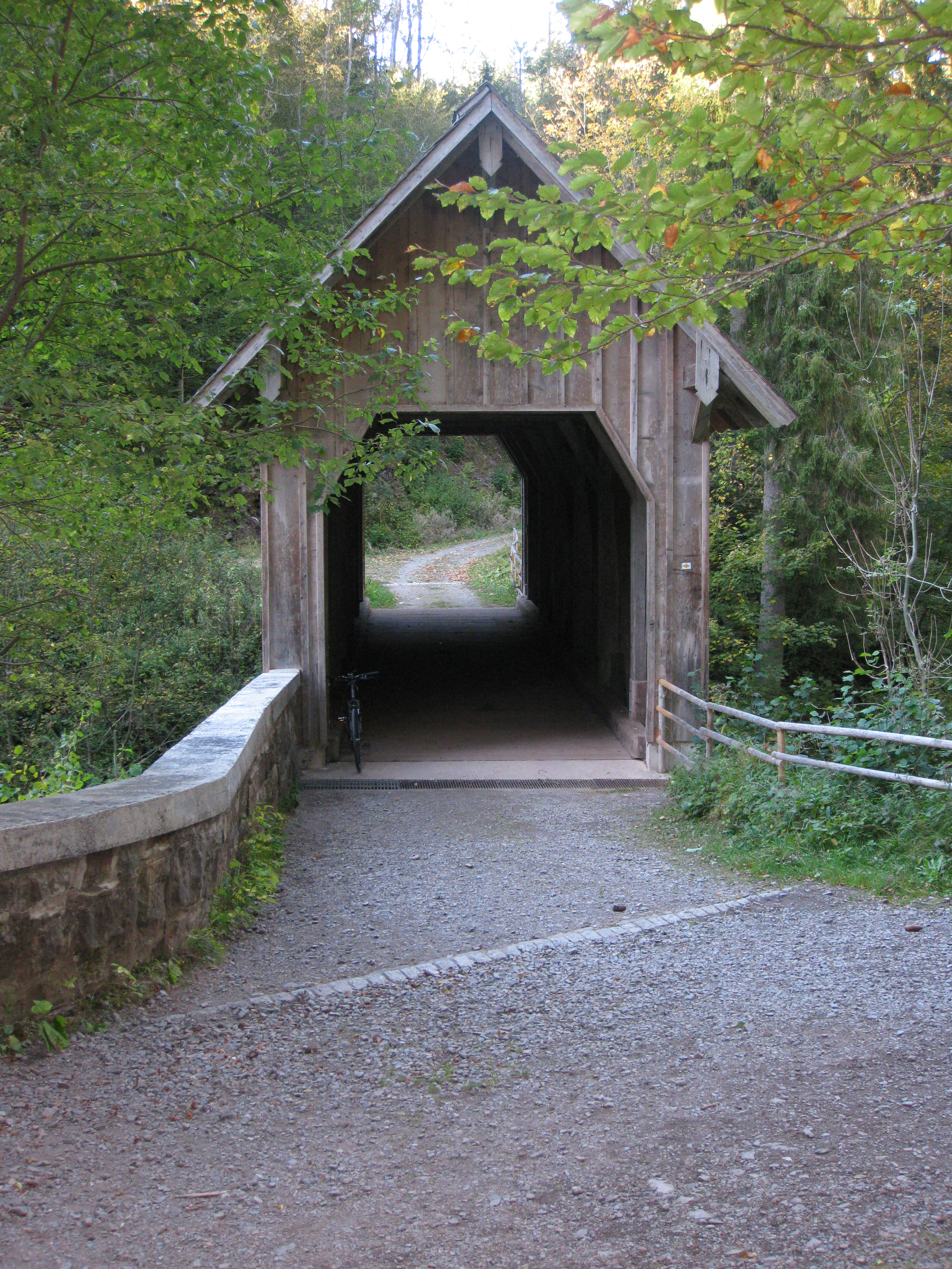 Stallegger Brücke (Wutachschlucht) Göschweiler Seite